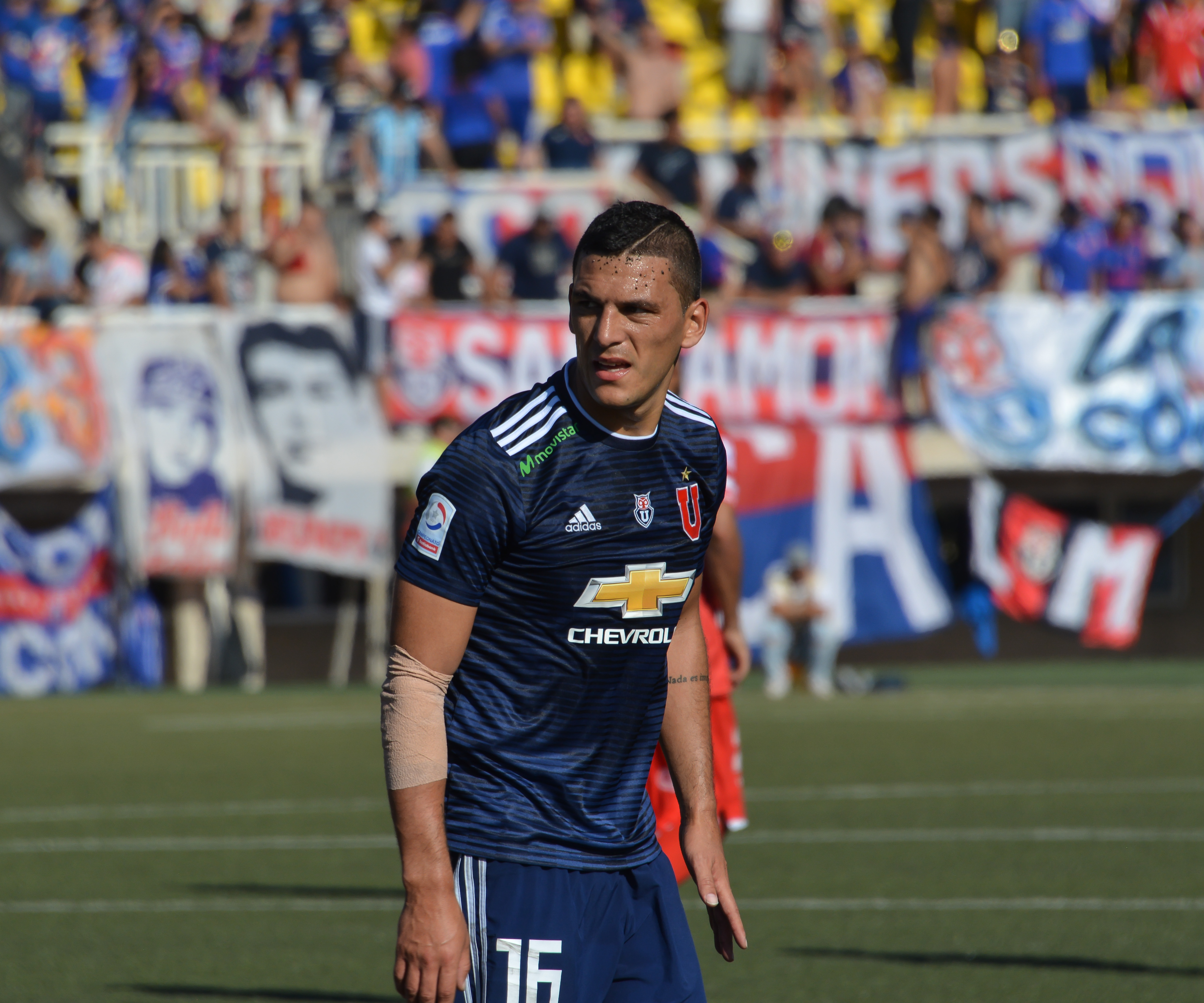 Unión La Calera v Universidad de Chile, Estadio Municipal Lucio Fariña Fernández, Quillota, Chile.